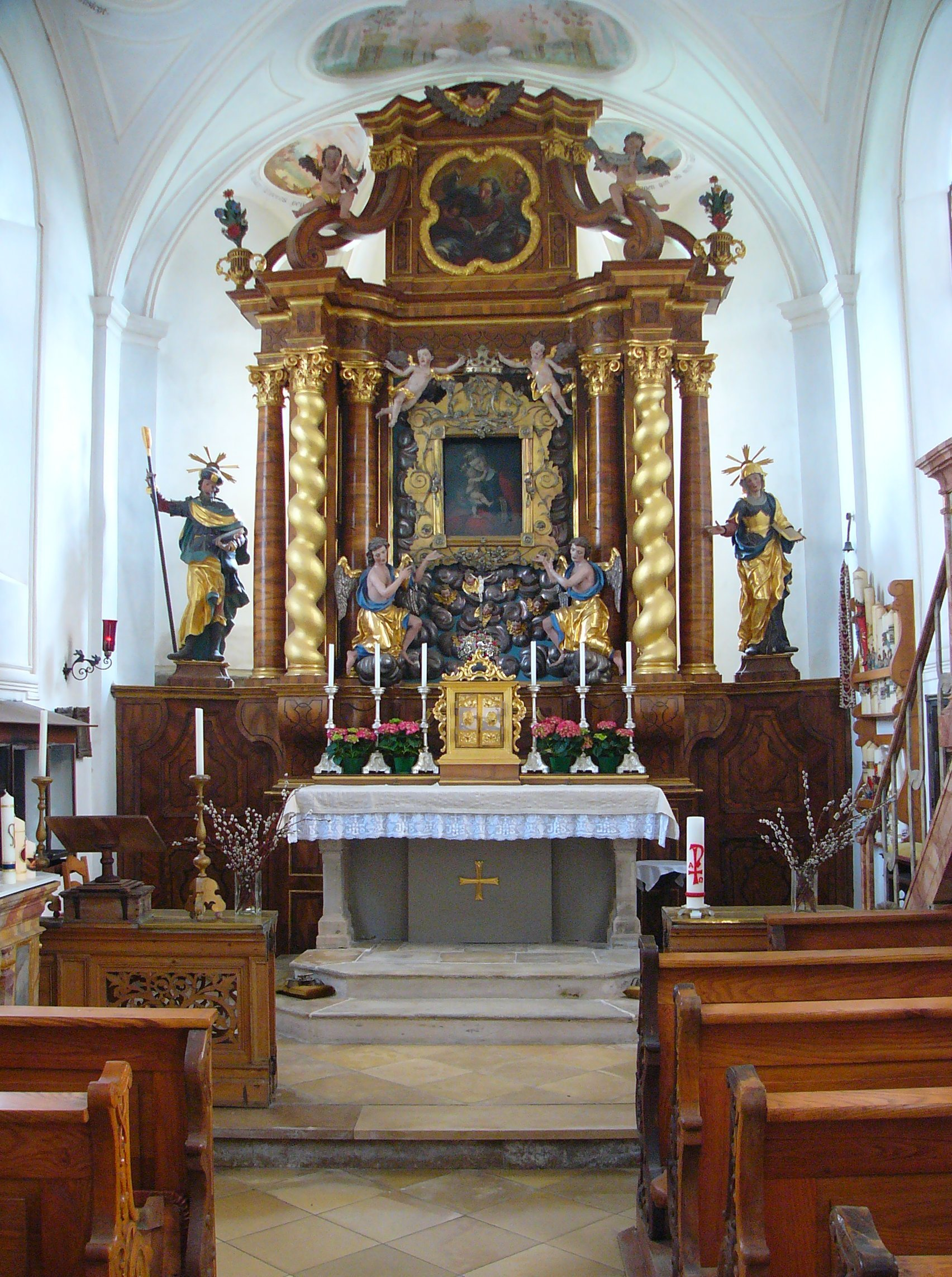 Landshut. In der Maria-Bründl-Kapelle. This is a photograph of an architectural monument.